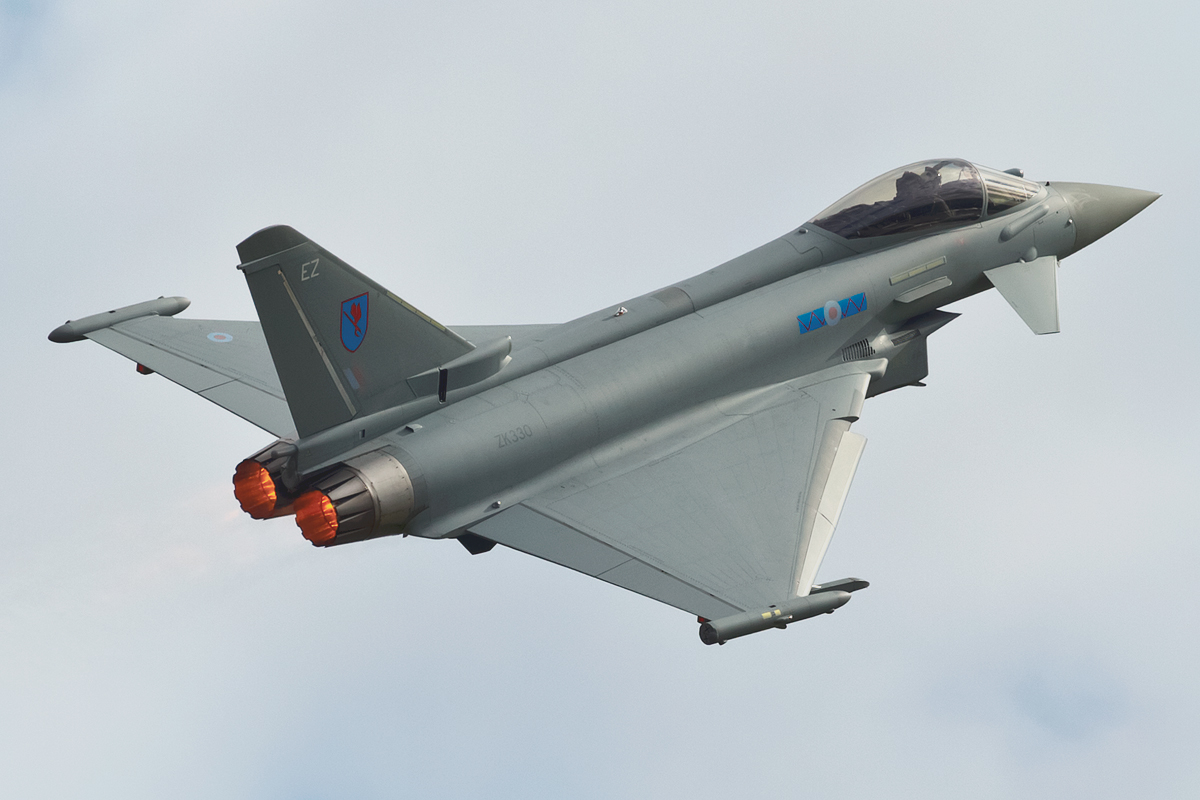 FIA 2012